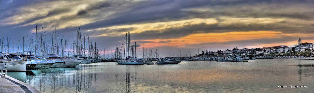 Foto Panoramica del Porto di Marina di Ragusa al Tramonto